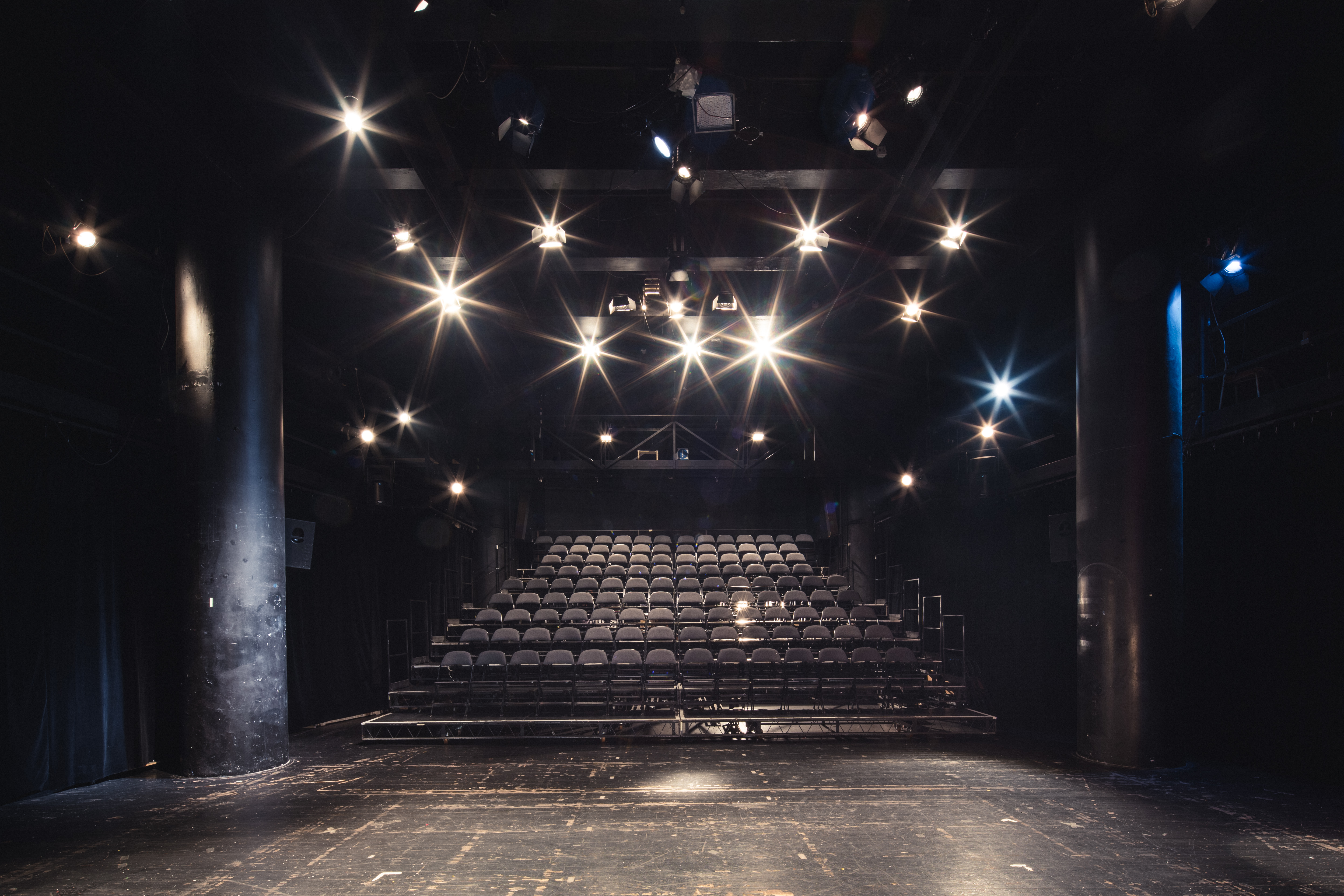 HaDivadlo - hlediště